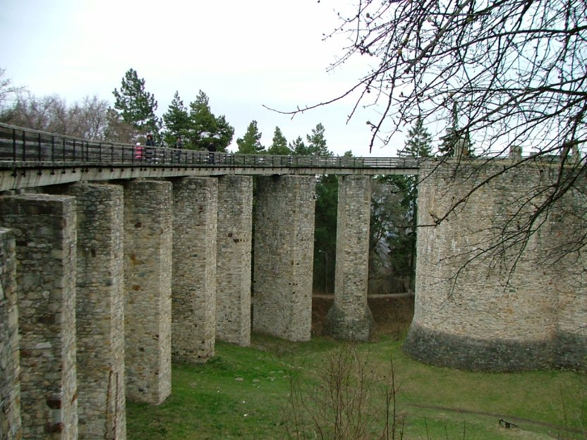 Neamţ Citadel, Târgu Neamţ, Romania